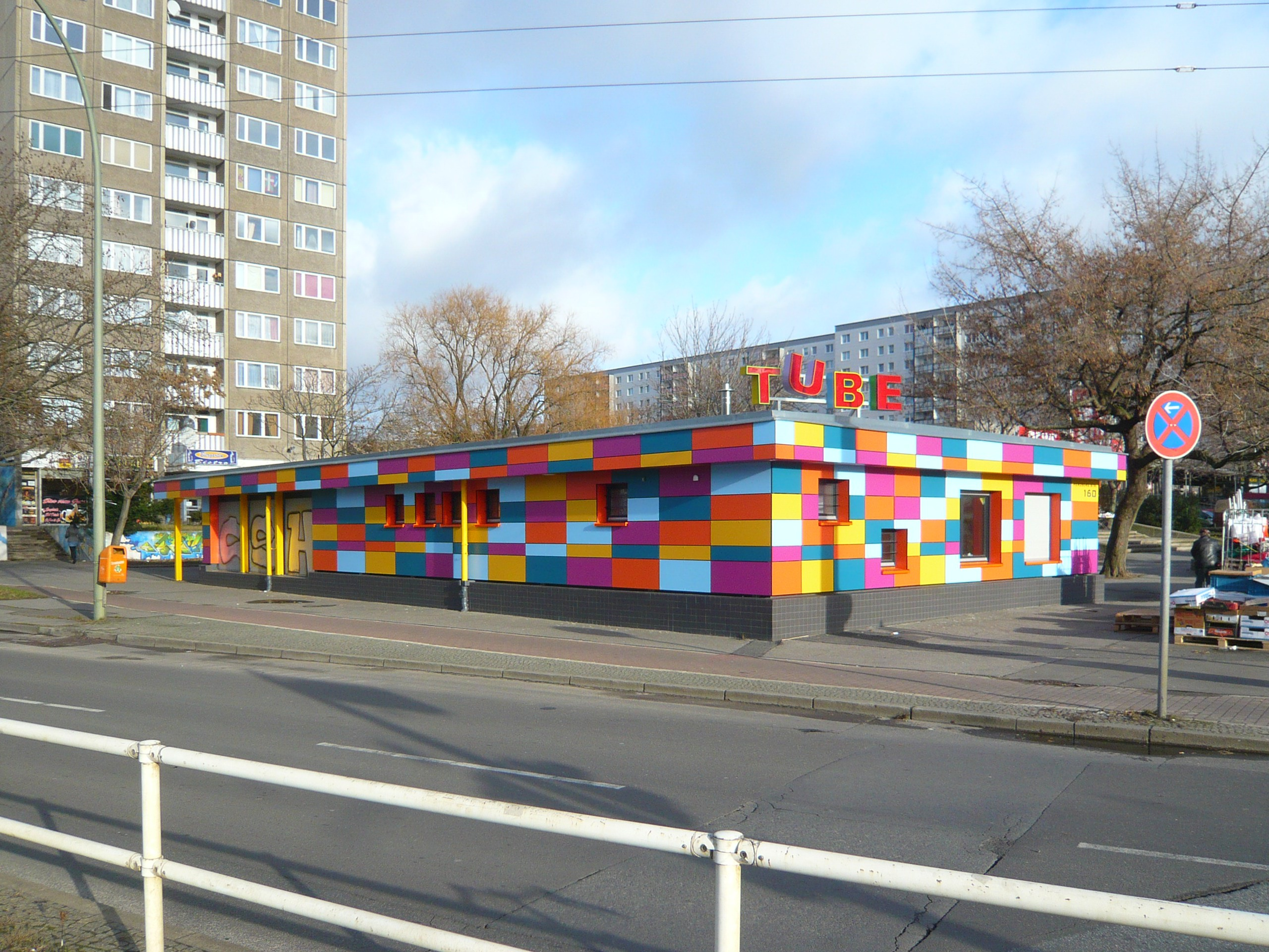 Bezirk Lichtenberg, Herzbergstraße Ecke Weißenseer Weg: Zugangsgebäude zum Jugendklub "Tube"